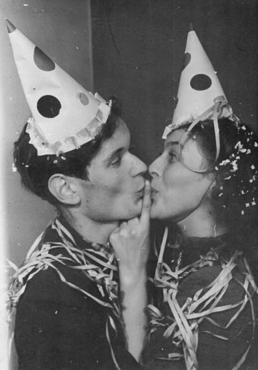 Neujahrsfest Sylvester Aufn. Illus Kemlein 4904-49 (3)